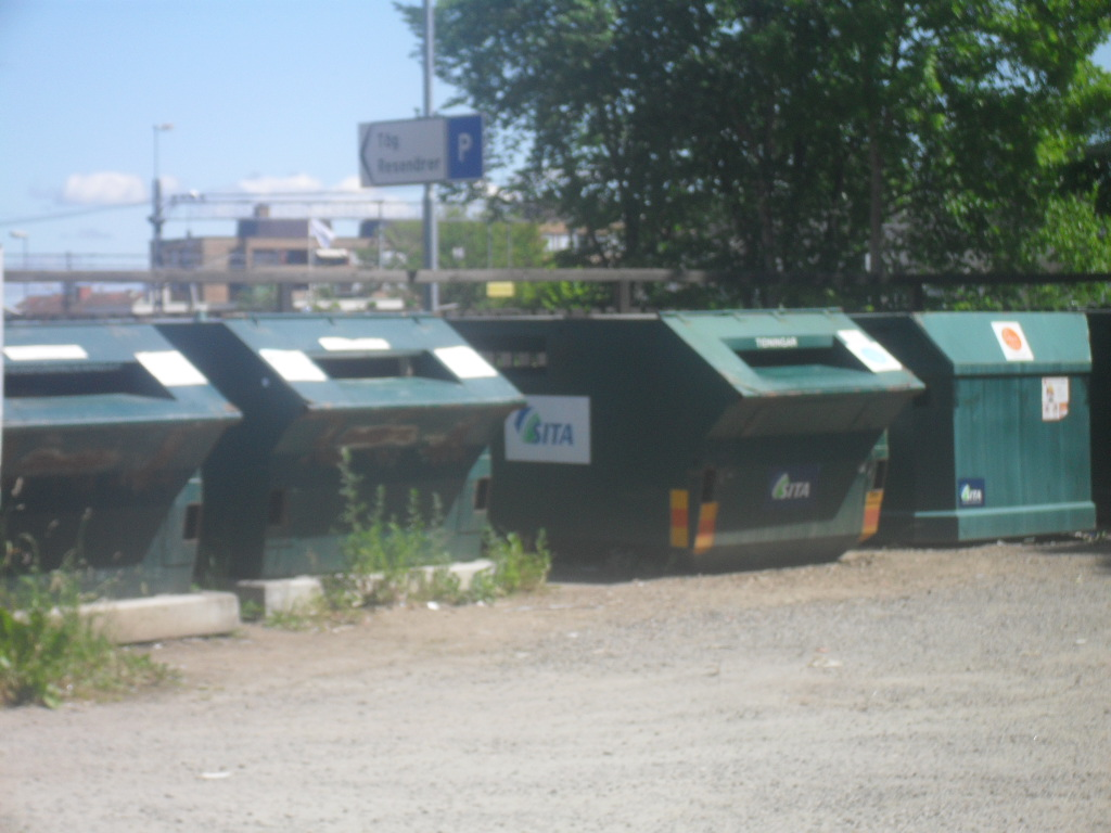 En återvinningsplats i Falköping.